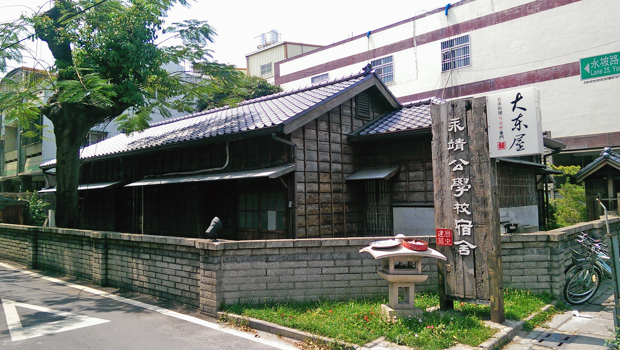 中文（台灣）: 永靖公學校宿舍